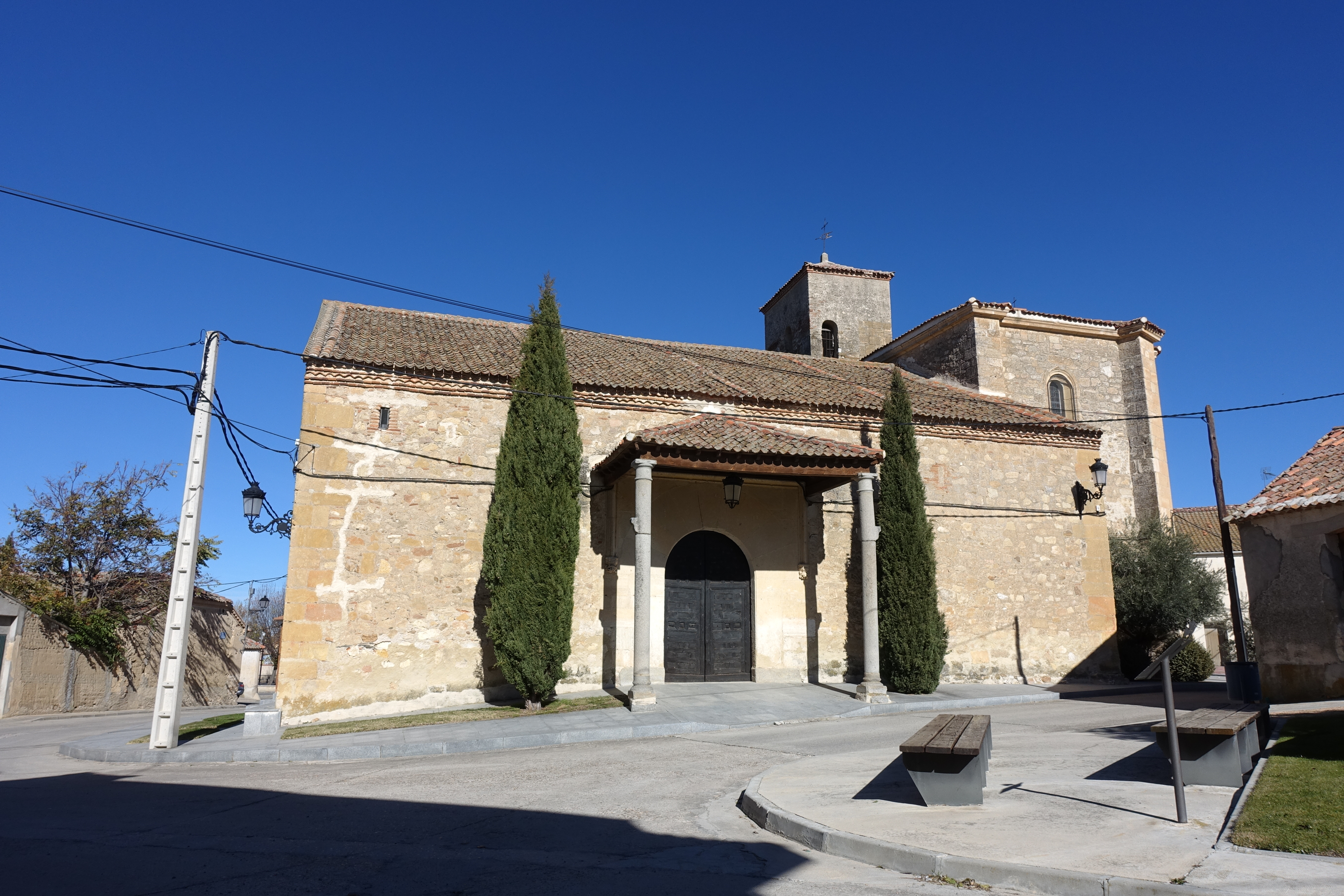 Iglesia de San Bartolomé, en Martín Miguel (Segovia, España).